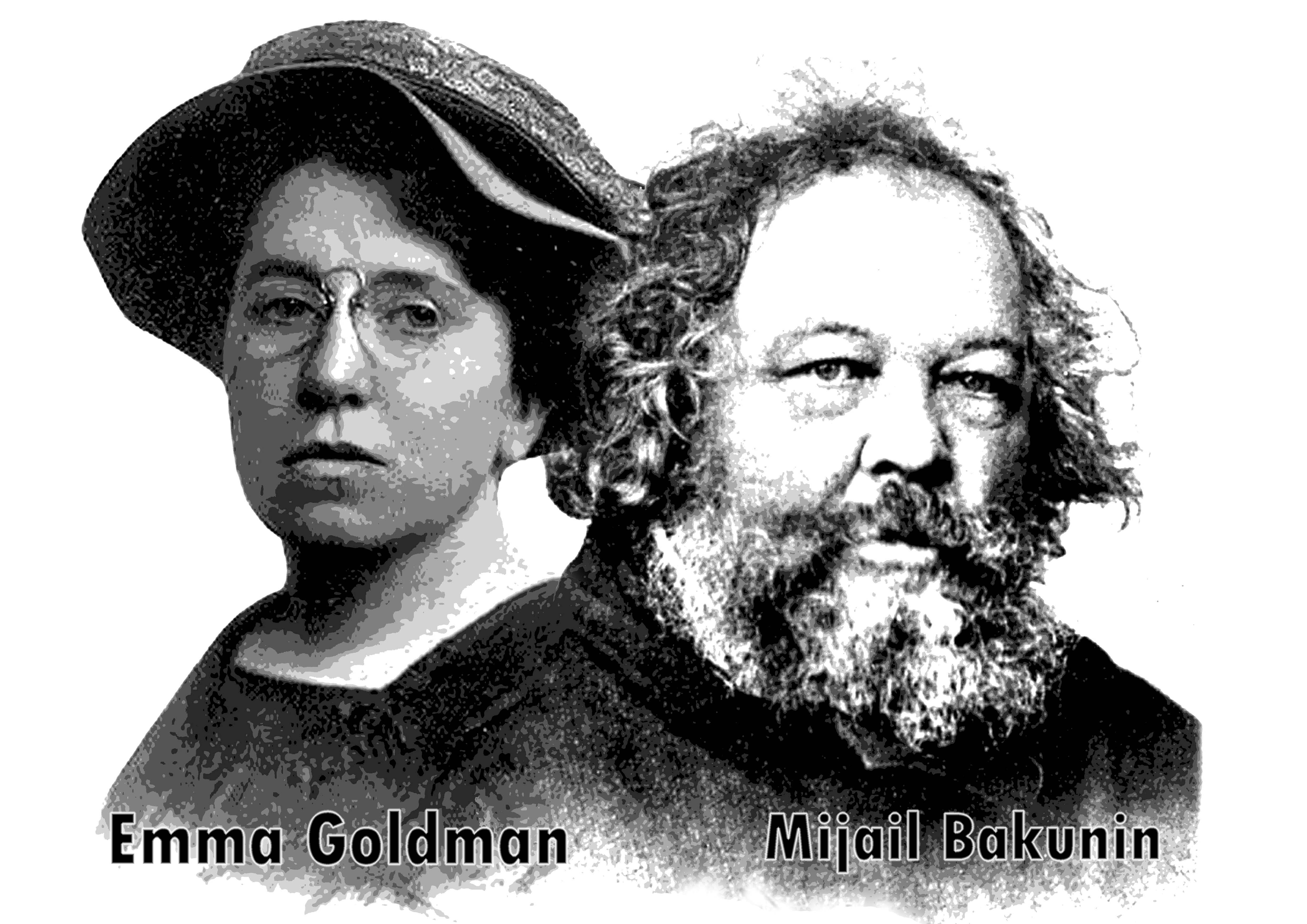 Un diseño para camisetas con los rostros de los anarquistas Emma Goldman y Mijaíl Bakunin.